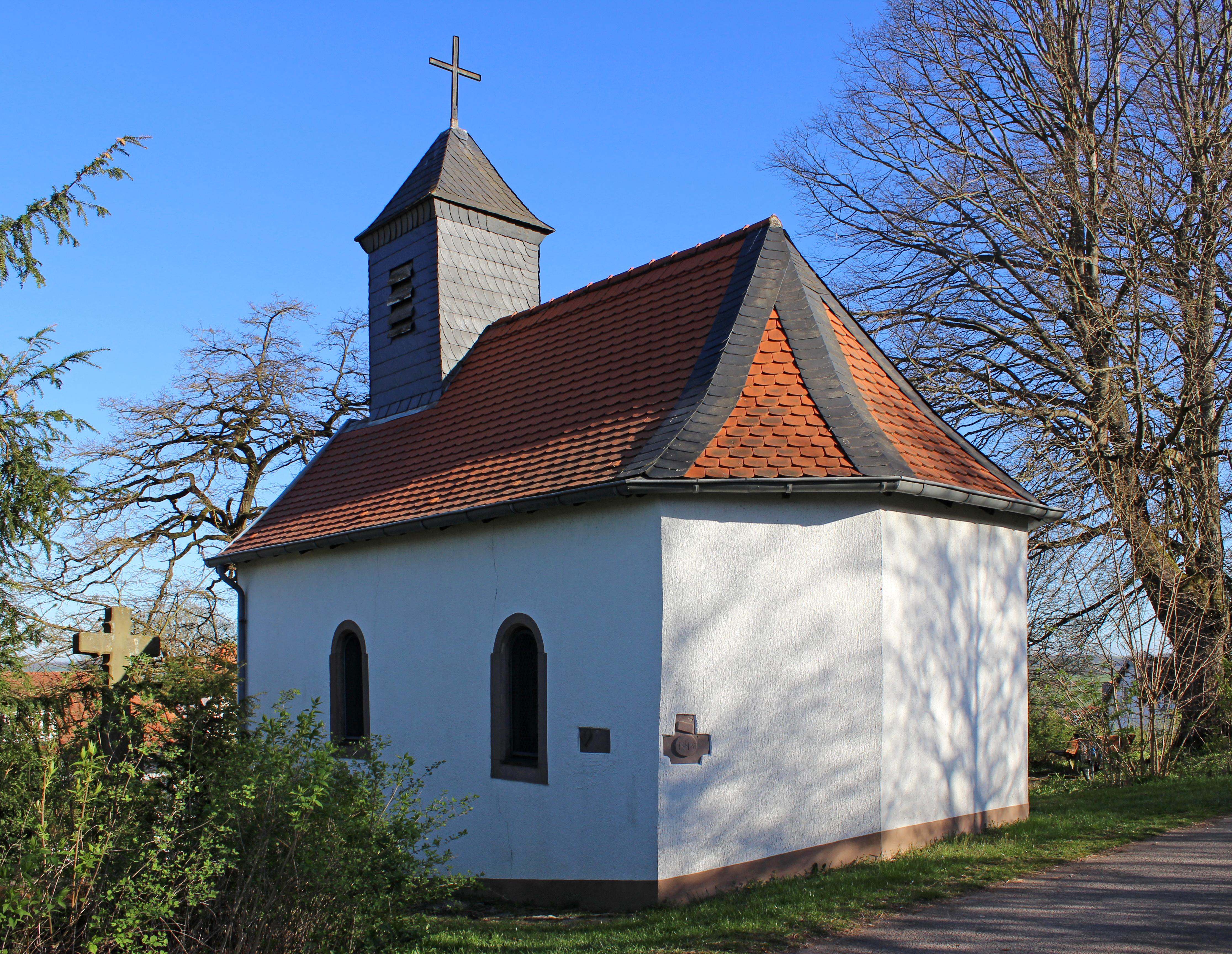 Die Strudelpeterkapelle in Ormesheim, Gemeinde Mandelbachtal, Saarpfalz-Kreis, Saarland